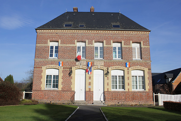 Saint-Symphorien (Eure) mairie (anciennement mairie école)